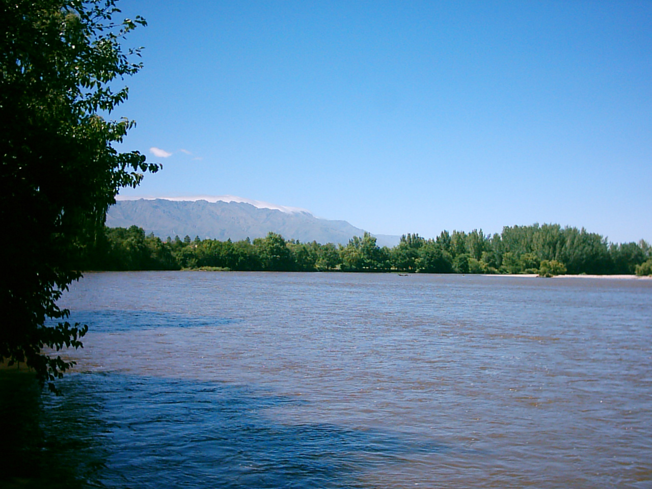 Río de los Sauces, Mina Clavero, Córdoba, Argentina